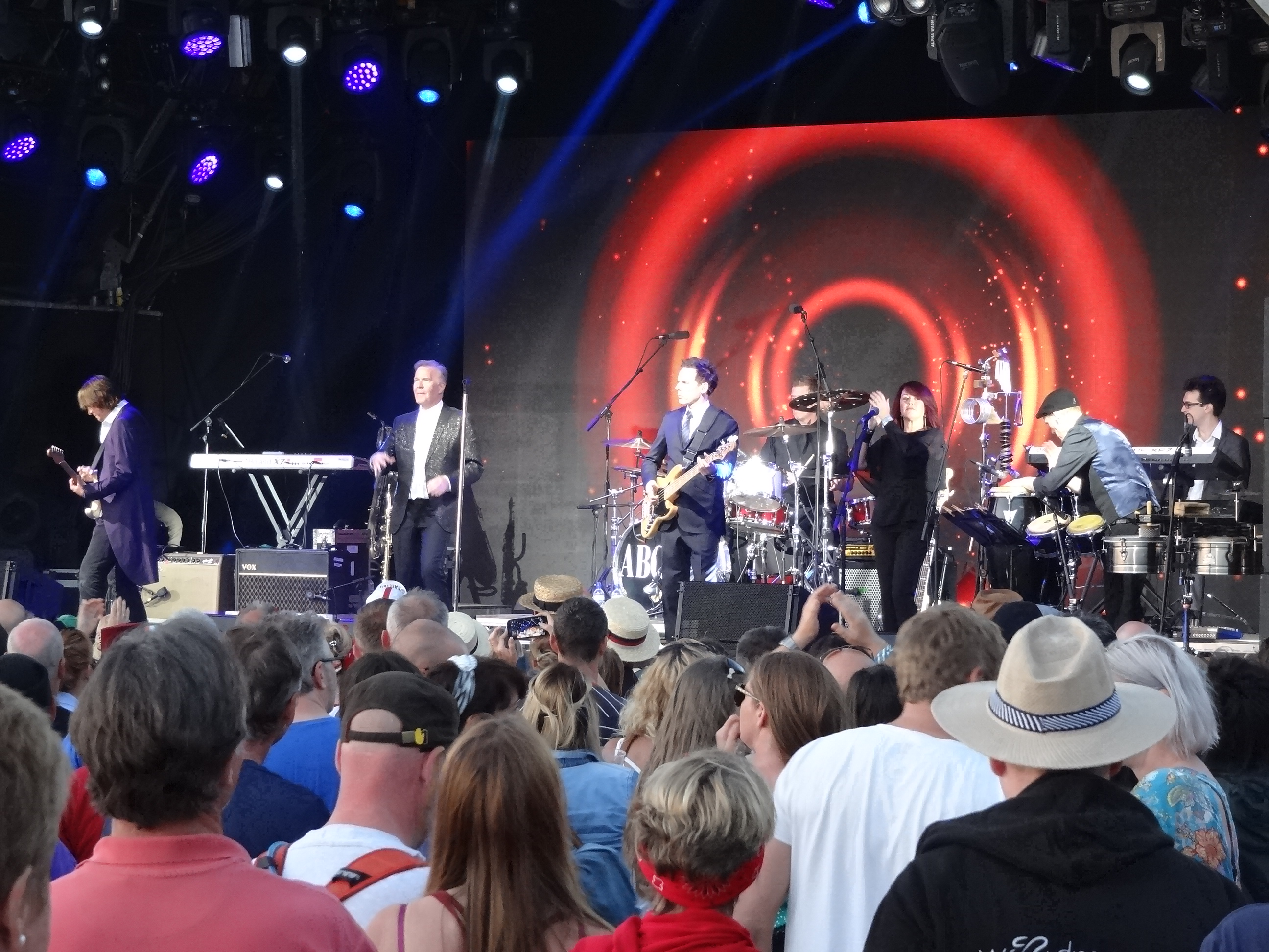 ABC at Eroica Britannia 2017